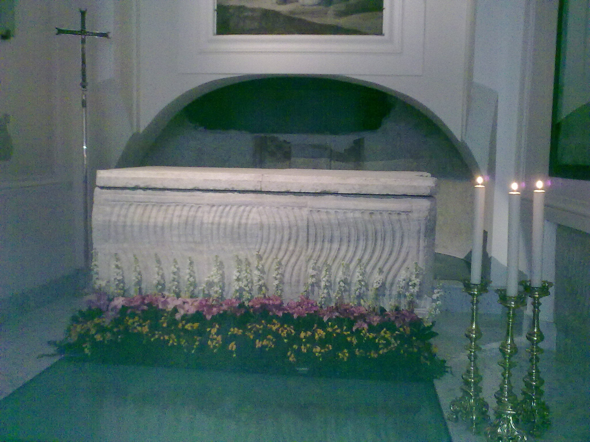 Sarcofago di San Prisco, presso la cattedrale di Nocera Inferiore (III secolo)